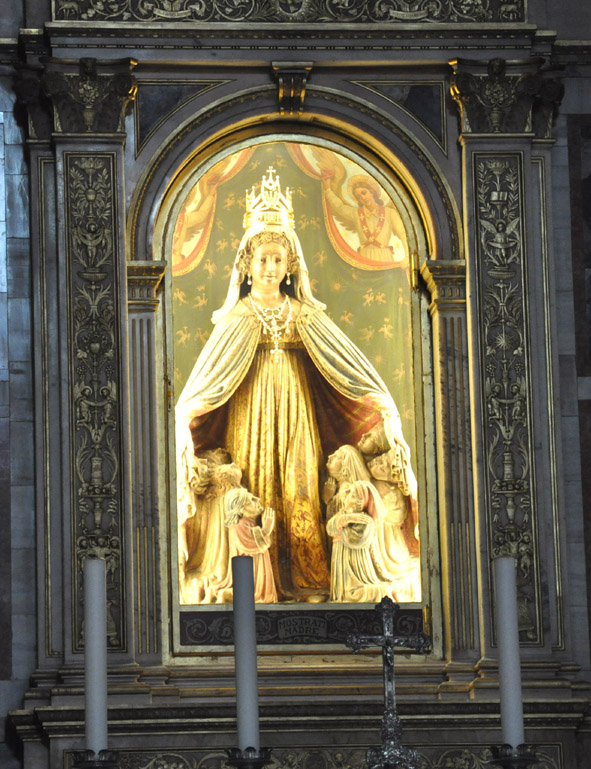 Statua della Madonna venerata nel Santuario di Monte Berico.